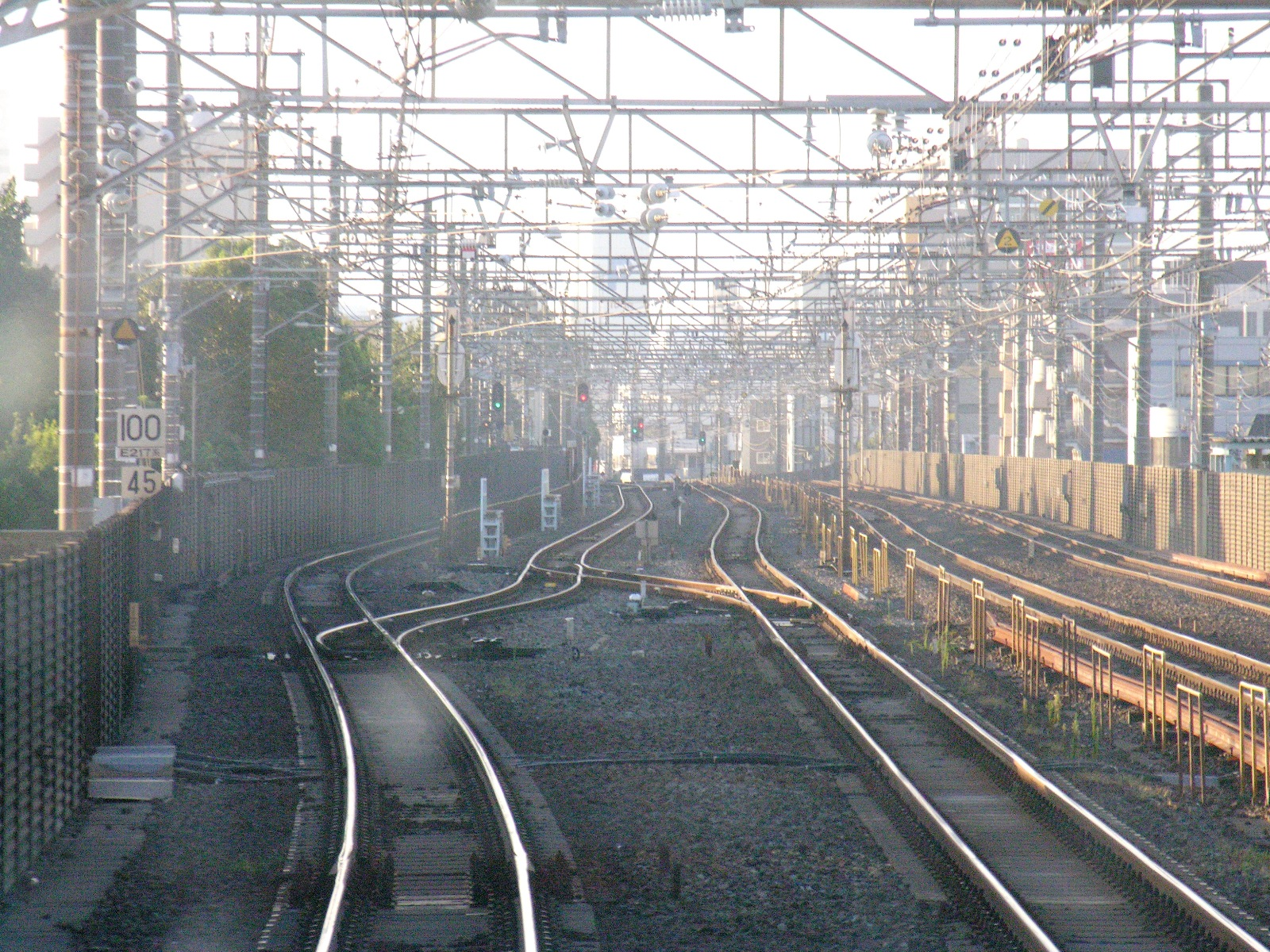 総武本線千葉～稲毛間にある黒砂信号場です。